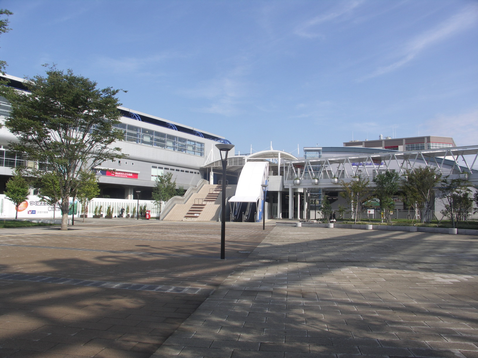 Nagareyama Otakanomori station south, Tsukuba Express, Tobu-Noda Line, Chiba, Japan, 流山おおたかの森駅南口